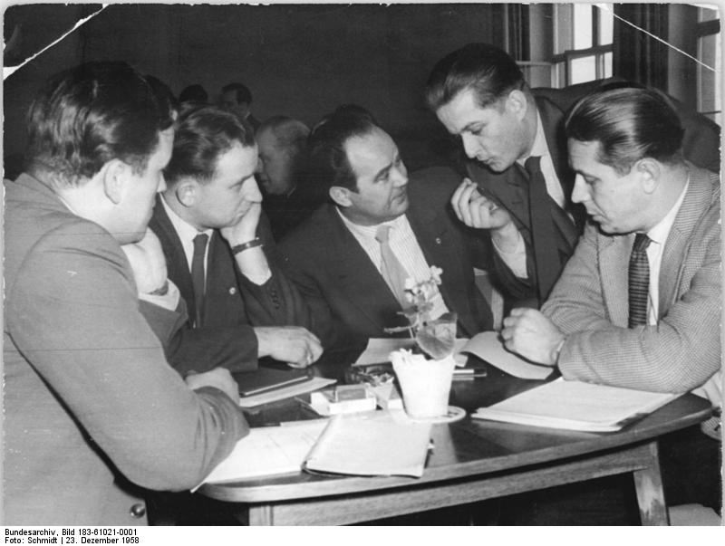 "Zentralbild-Schmidt 23.12.1958 Froe-L Betriebe der VVB Elektrochemie und Plaste verdoppeln Produktion bis 1965. Ã–konomische Konferenz Ã¼ber Aufgaben im Chemieprogramm. Mehr als verdoppeln wird sich die Produktion der Betriebe der VEB Elektrochemie und Plaste bis 1965 gegenÃ¼ber diesem Jahr. Diese Feststellung traf der Hauptdirektor der VVB, Eberhard Fickler auf einer Ã¶konomischen Konferenz im Klubhaus der Buna-Werke. Er betonte, zur Meisterung dieser Aufgabe mÃ¼sse jede Quelle zur Steigerung der ArbeitsproduktivitÃ¤t genutzt werden. Fickler forderte die Teilnehmer der Konferenz auf, dazu beizutragen, die Arbeitsweise der VVB und der Betriebe revolutionÃ¤r zu verÃ¤ndern. (Siehe ADN-Meldung Nr. 238 v. 22.12.1958) UBz.: WÃ¤hrend einer Tagungspause im angeregten Gedankenaustausch: (v.l.n.r.) Sepp Teisner, FDJ-SekretÃ¤r im Sodawerk "Karl Marx" , Bernburg; Eberhard Ageorge, Werkleiter des gesamten Werkes; Friedrich Hauck, technischer Leiter im Sodawerk; Werner Oertelt, Mitglied des Zentralvorstands der IG Chemie und Fritz Konrad, ParteisekretÃ¤r im Sodawerk."